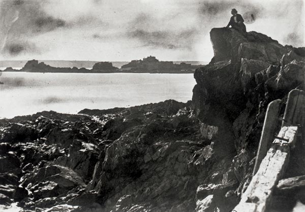 photographie de Victor Hugo (1802-1885) prise par Charles Hugo en 1853